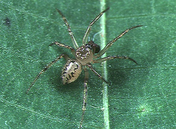 male Dipoena mustelina from Okinawa.